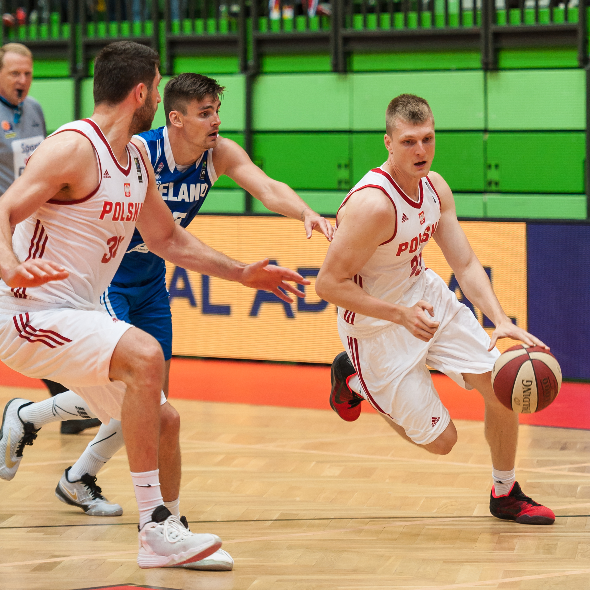 ÖBV Vier-Nationen-Turnier vom 12.-14. August 2016 in Schwechat: Polen vs Island. Bild zeigt Adam Hrycaniuk (POL), Hoerdur Axel Vilhjalmsson (ISL) und Karol Gruszecki (POL).